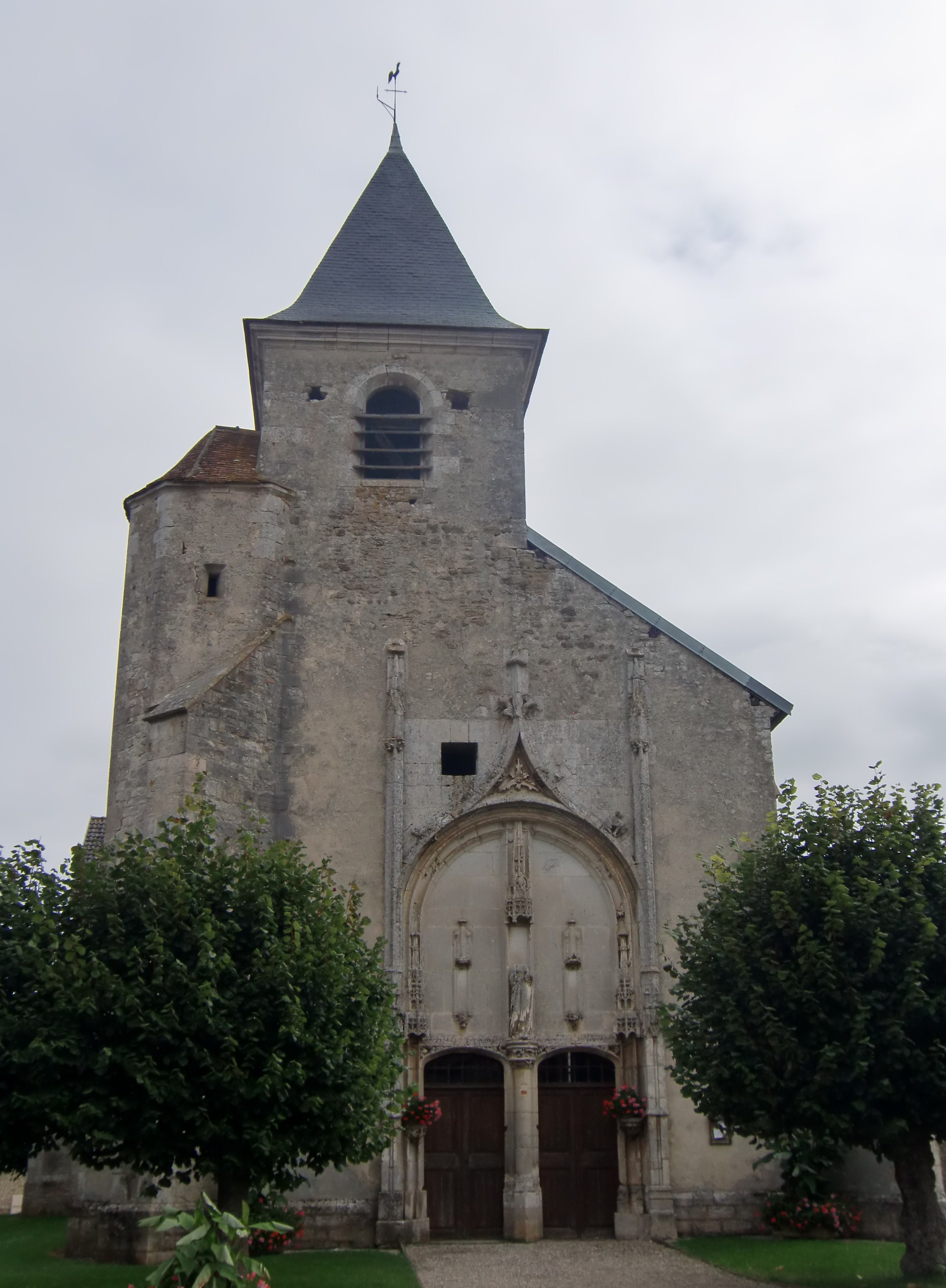 Eglise de Jully-sur-Sarce (Aube - Champagne - France)